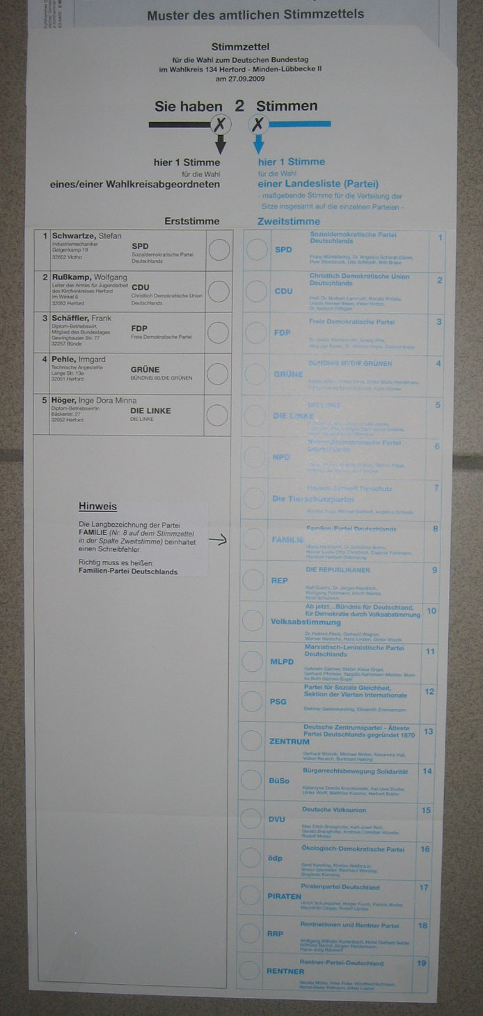 Stimmzettel Bundestagswahl 2009 im Wahlkreis im Herford – Minden-Lübbecke II